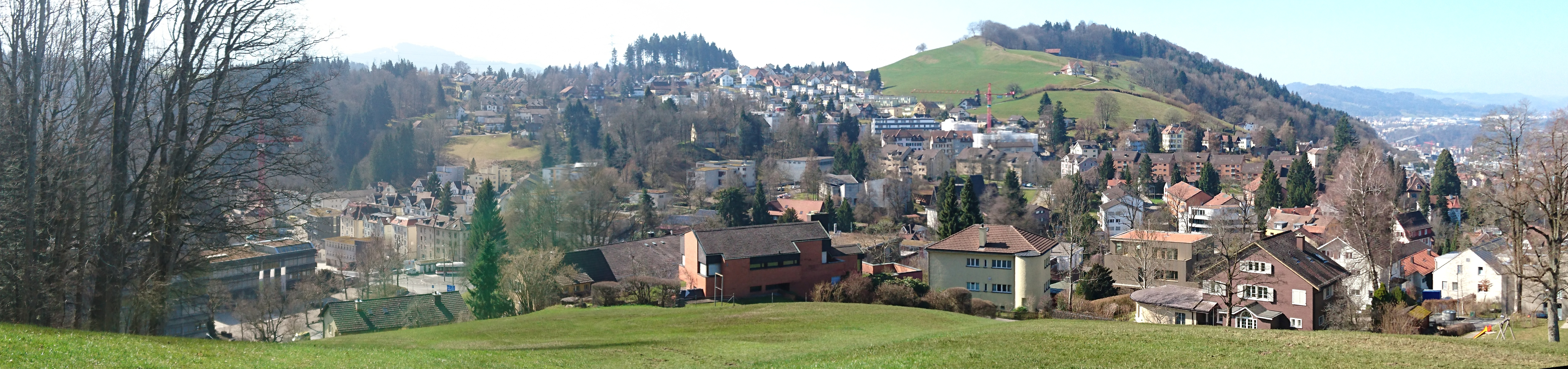 Panorama des Riethüsliquartiers St. Gallen, Blick von der Berneck Richtung Südwesten.